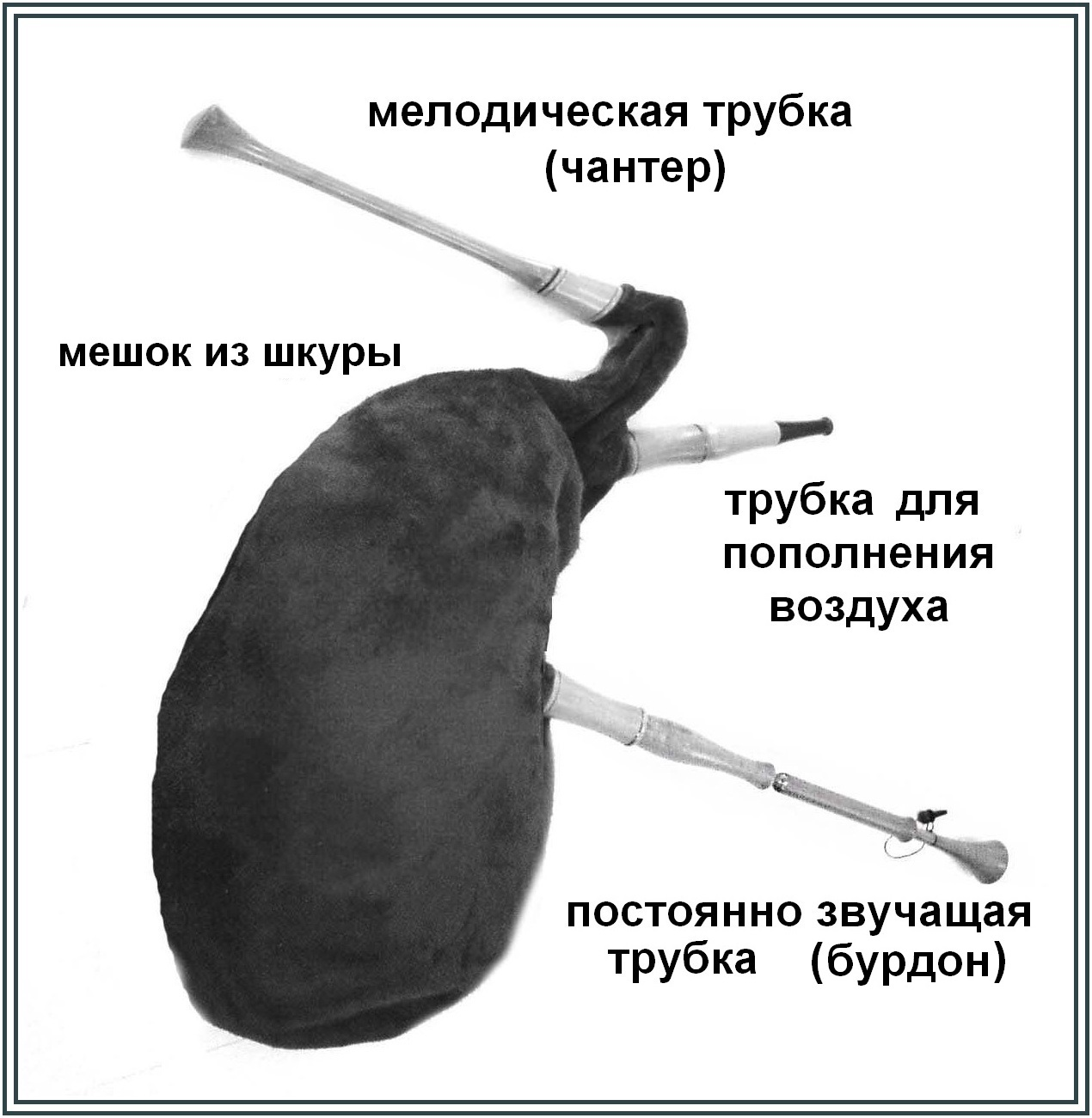 Схема устройства волынки.